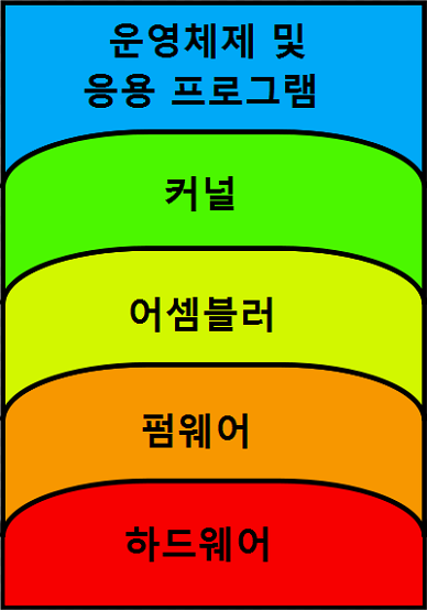 컴퓨터 추상 계층으로, 직접 그린 것입니다.